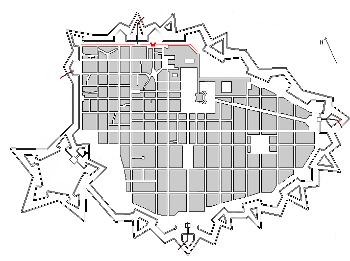 Mappa della seconda espansione della città di Torino, 1673